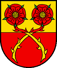 Wappen von Schwändi Kanton Glarus Schweiz